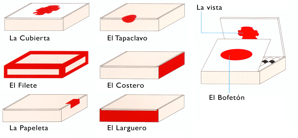 Nom des étiquettes d'une boîte de Habanos (cigares cubains)